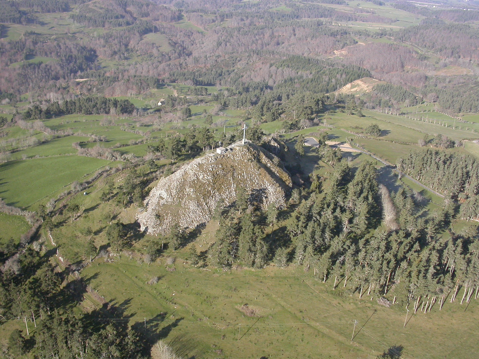 Auteur : Christophe Chappet Vue aérienne du Roc de Peyre près de Saint Sauveur de Peyre